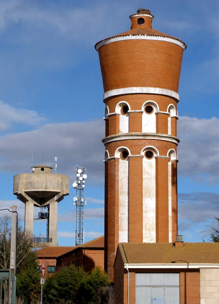 Santa María del Páramo (León)